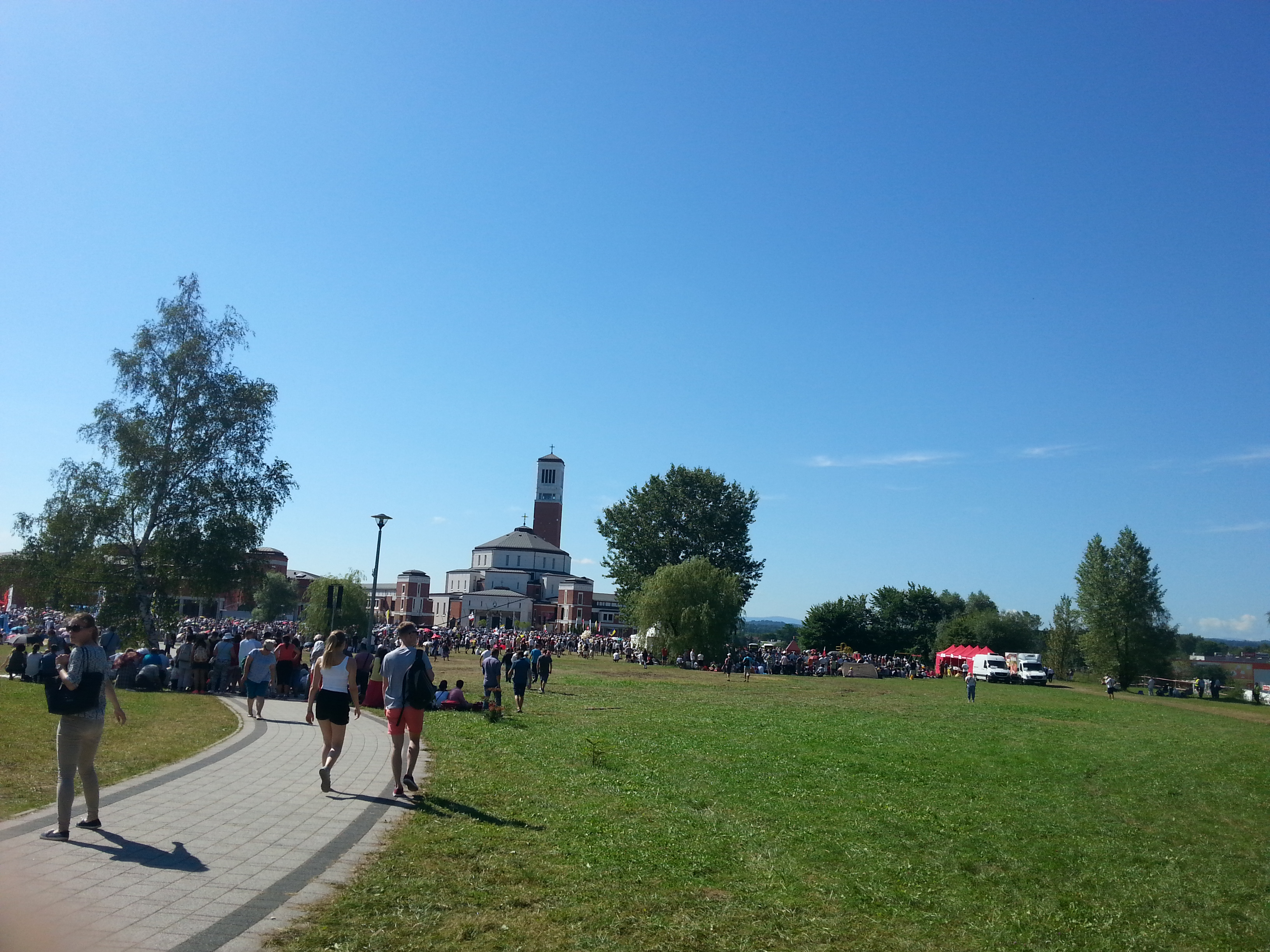 Światowe Dni Młodzieży w Krakowie